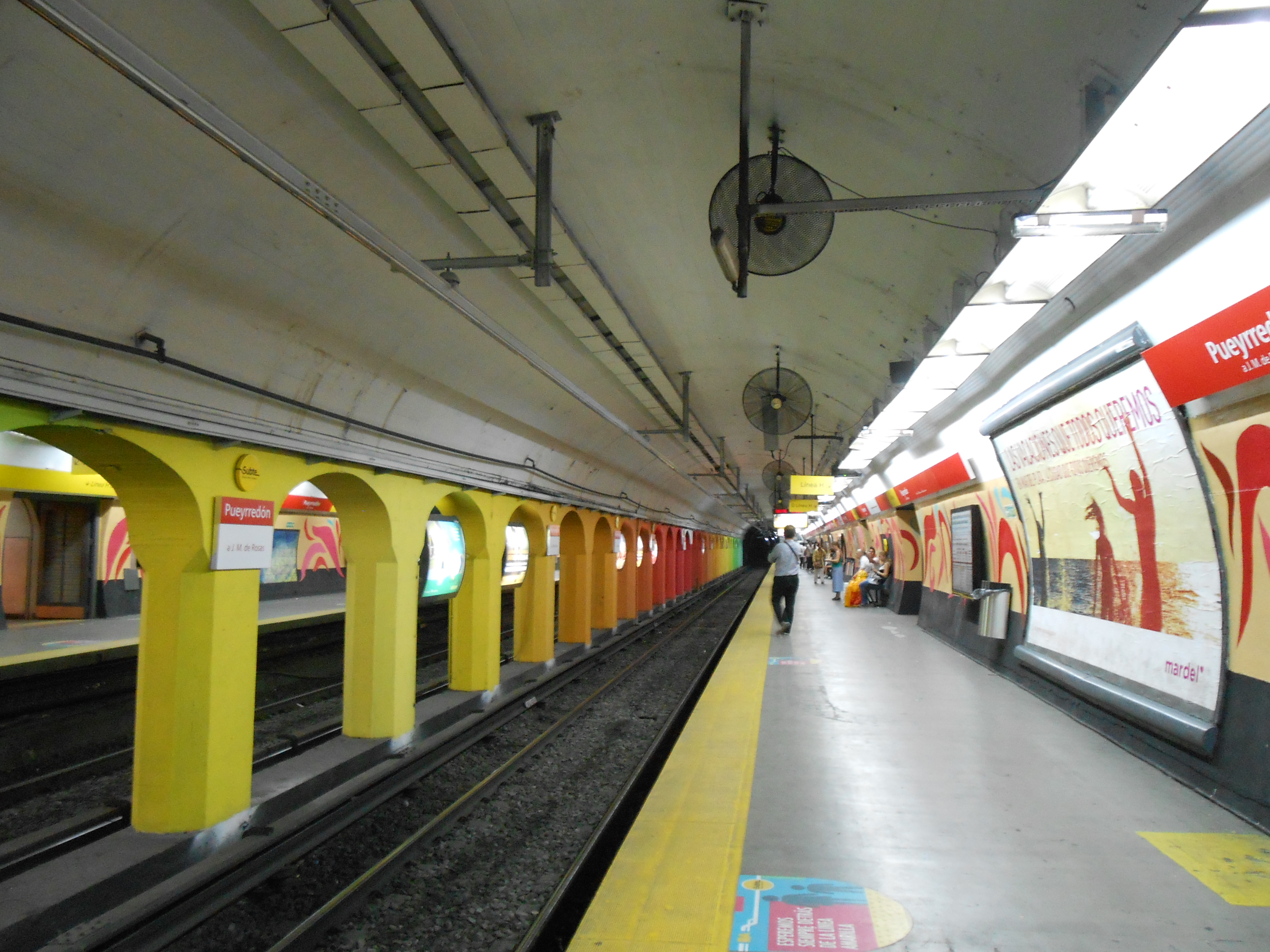 La estación Pueyrredón de la línea B del metro de Buenos Aires, CABA, Argentina